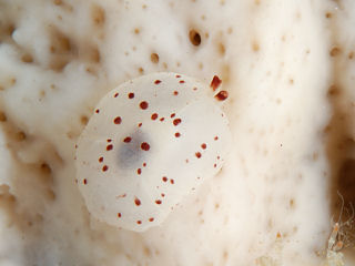 Berthella martensi, juvenil a 3 m, Osezaki, Japón